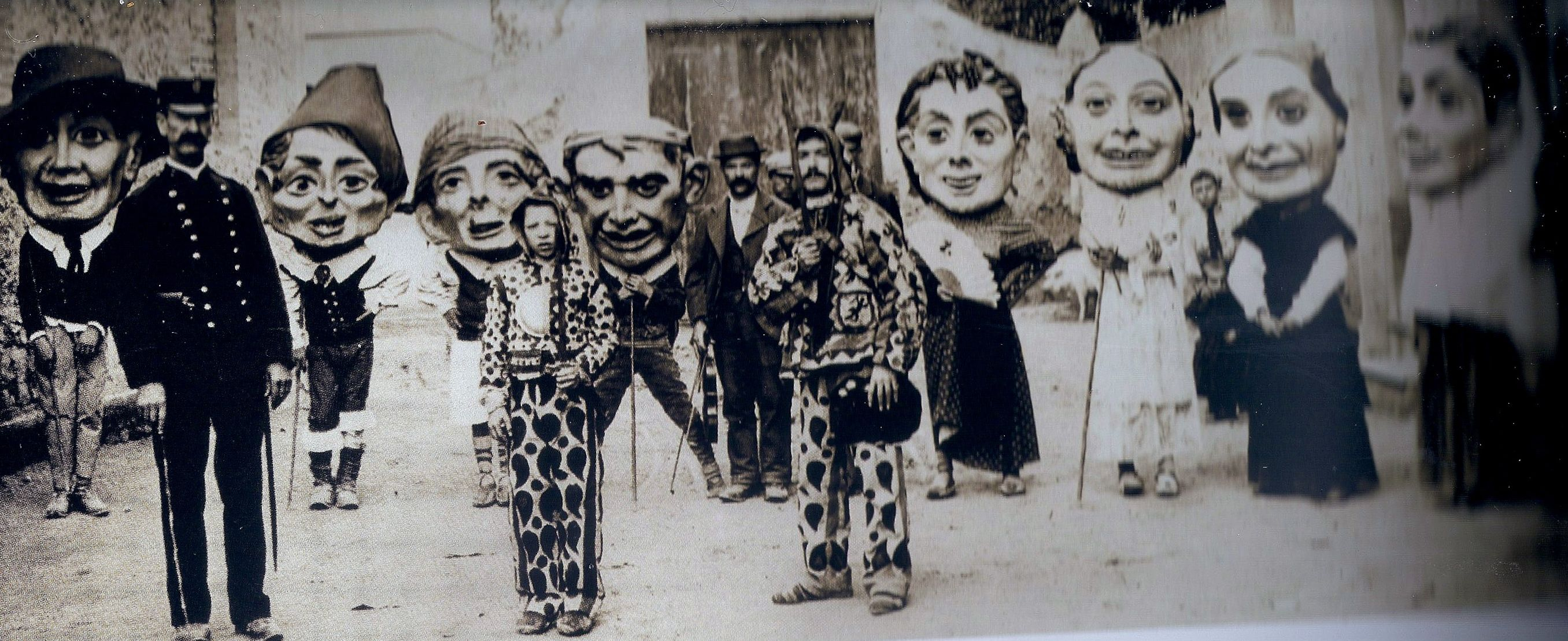 Fotografia dels Nanos de Reus el 1899 a la Plaça del Castell